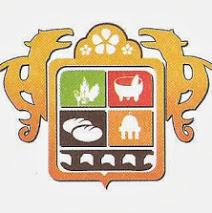 Escudo de Numarán, Michoacán, México.